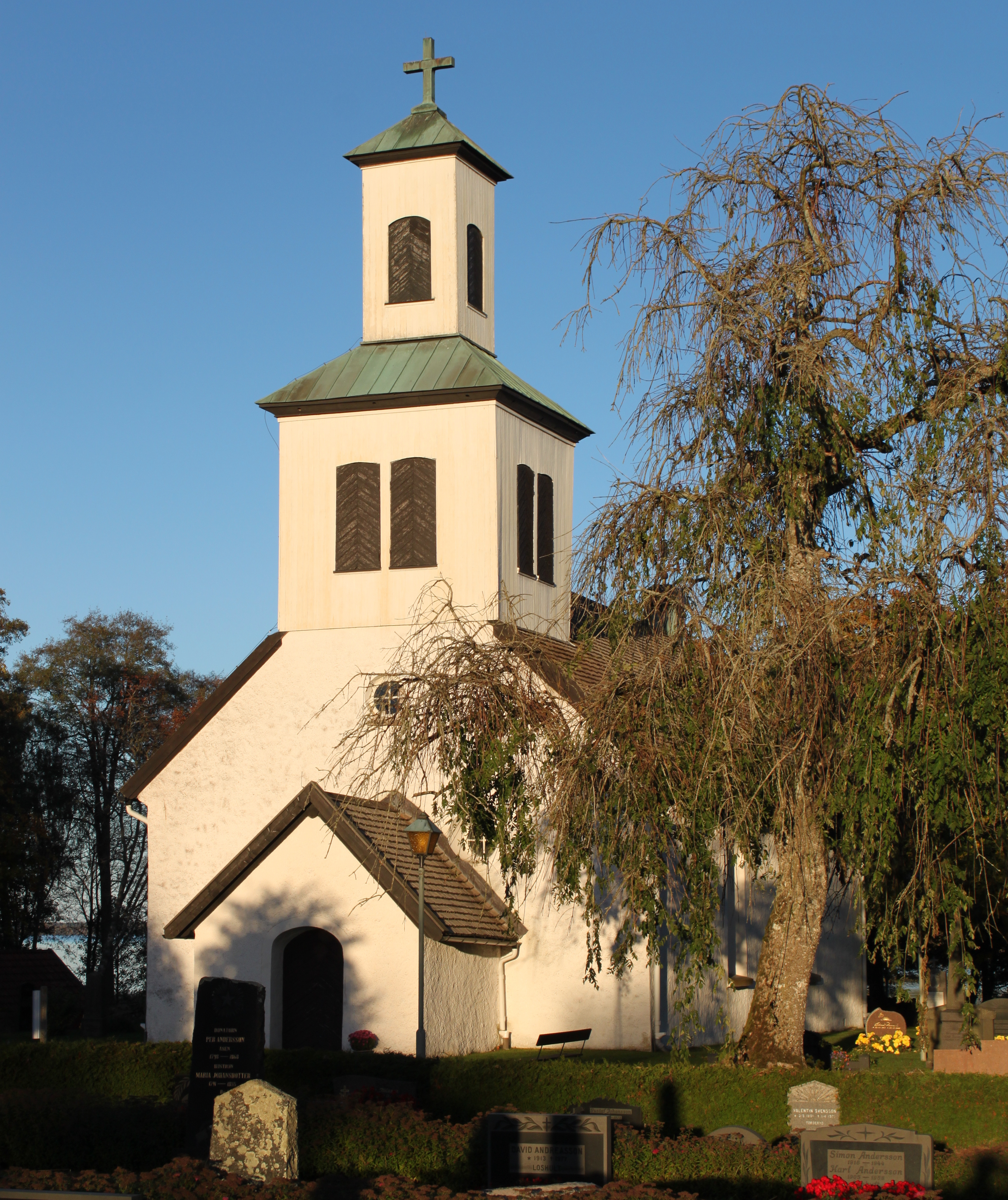 Odensjö kyrka